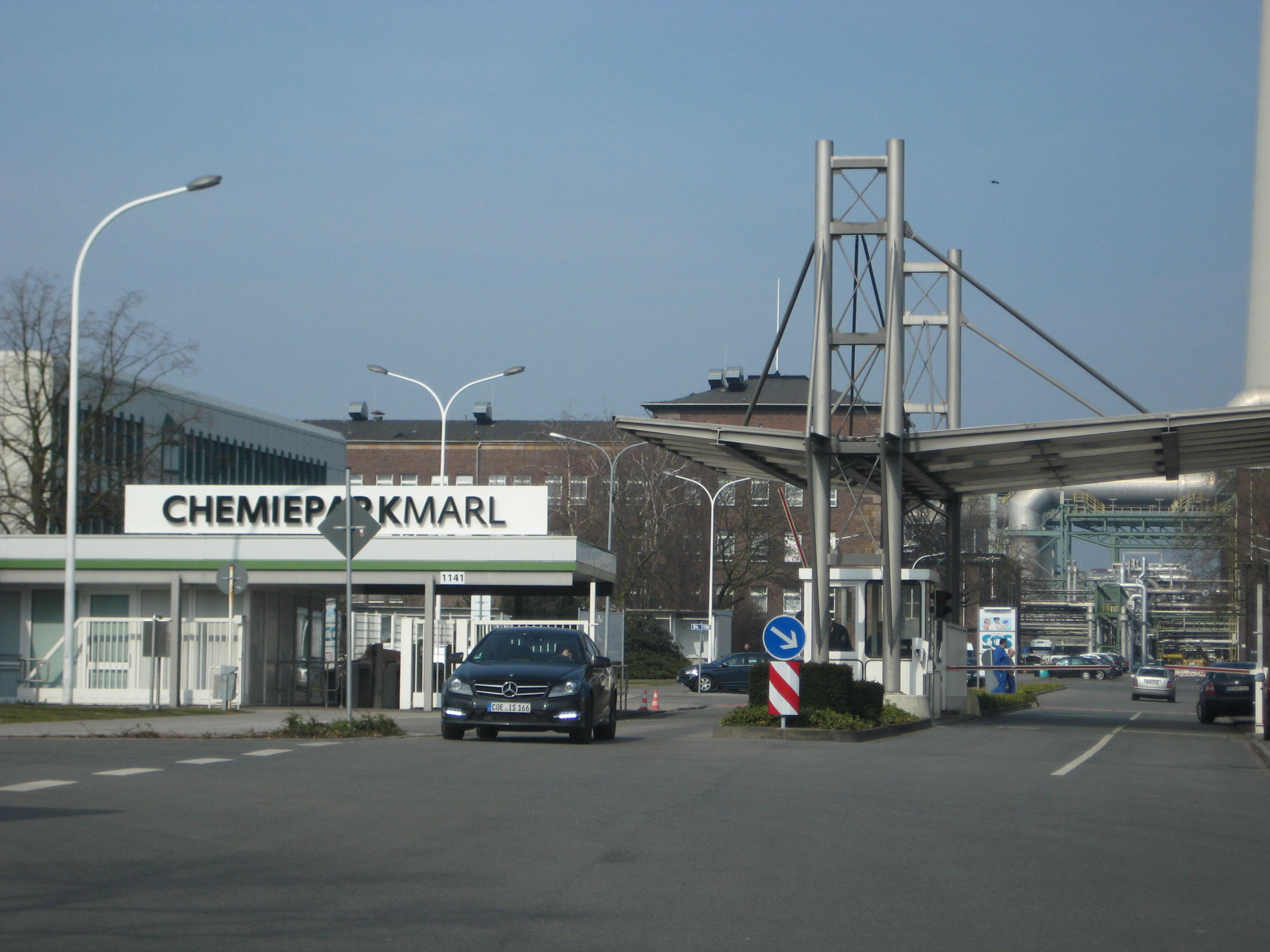 Eingang / Haupttor des Chemiepark Marl (vormals Chemische Werke Hüls) mit neuem Chemiepark-Logo